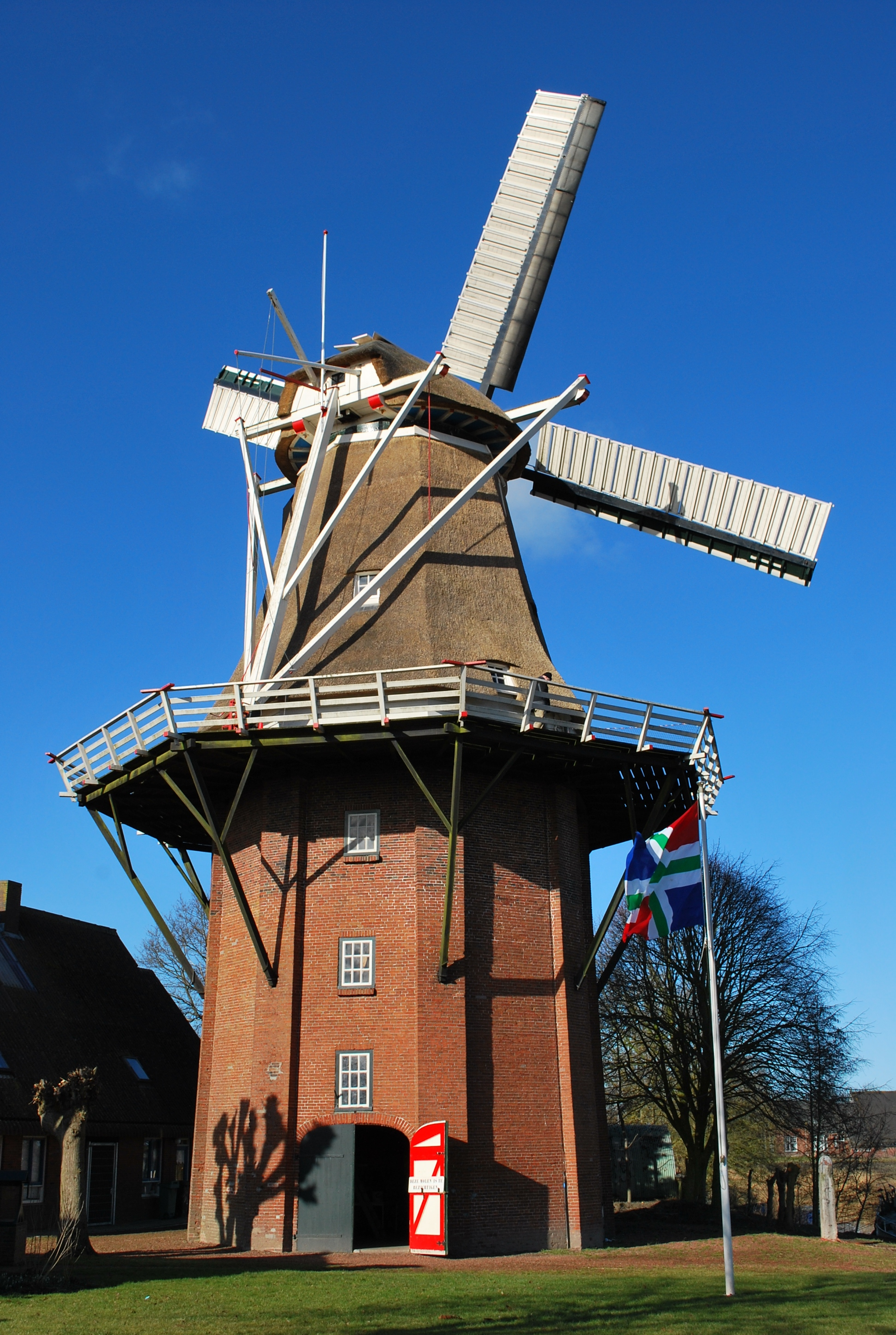 Koren-pelmolen De Grote Geert(GN). Deze koren-pelmolen staat in het groningse dorp Kantens,de wiekenlengte is 21.90M.